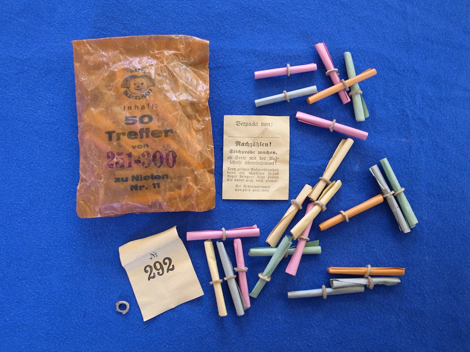 Röllchenlose mit Ring, ca. 1940